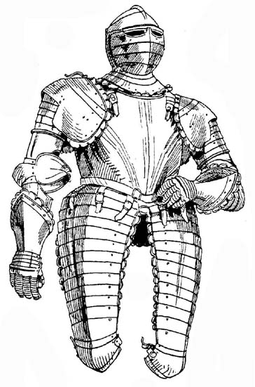 Geschobener halber Harnisch